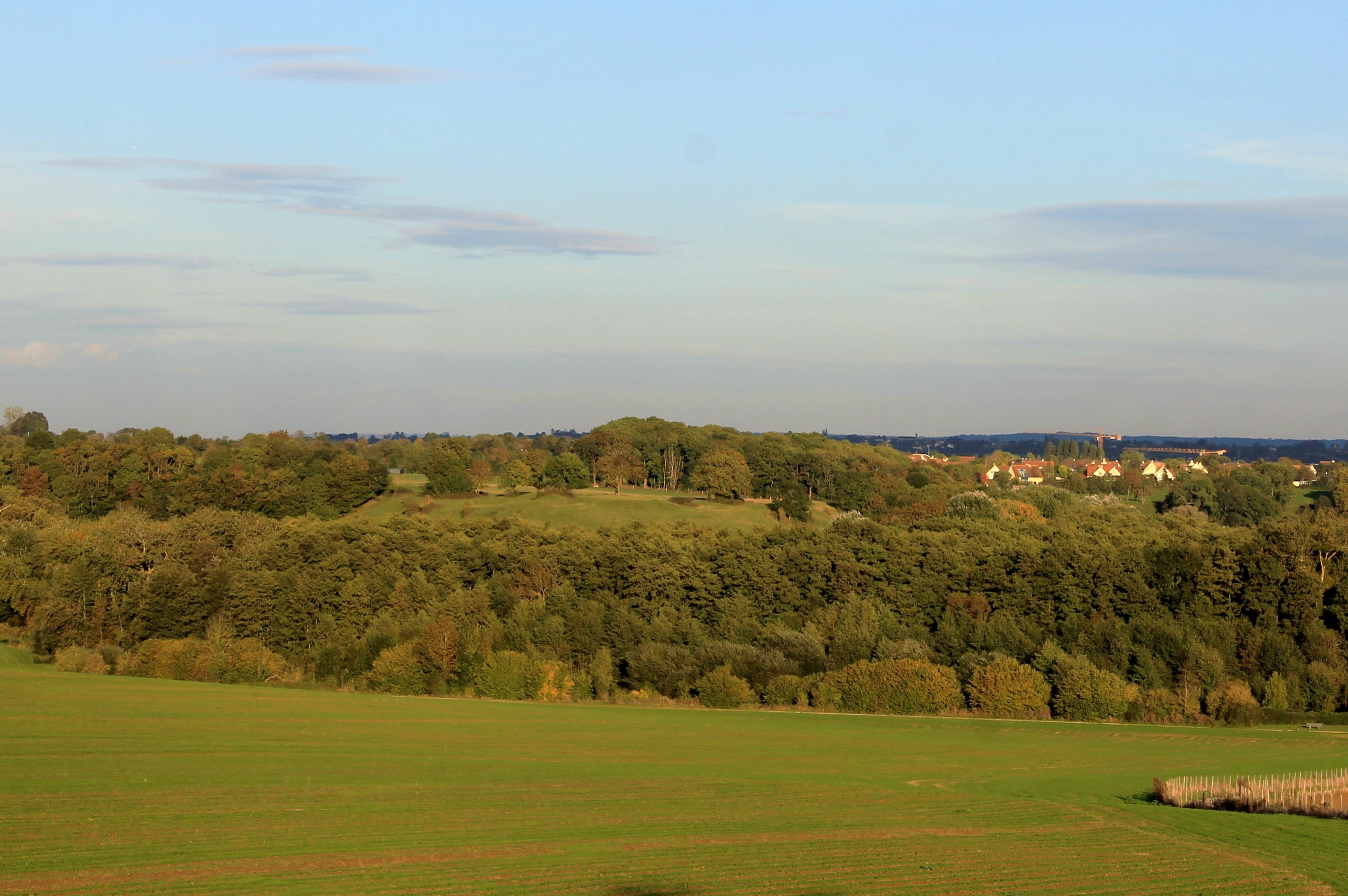 Oppidum gallo-romain à Blainville-sur-Orne (Calvados)